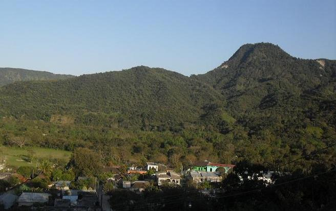 El Xotialitl